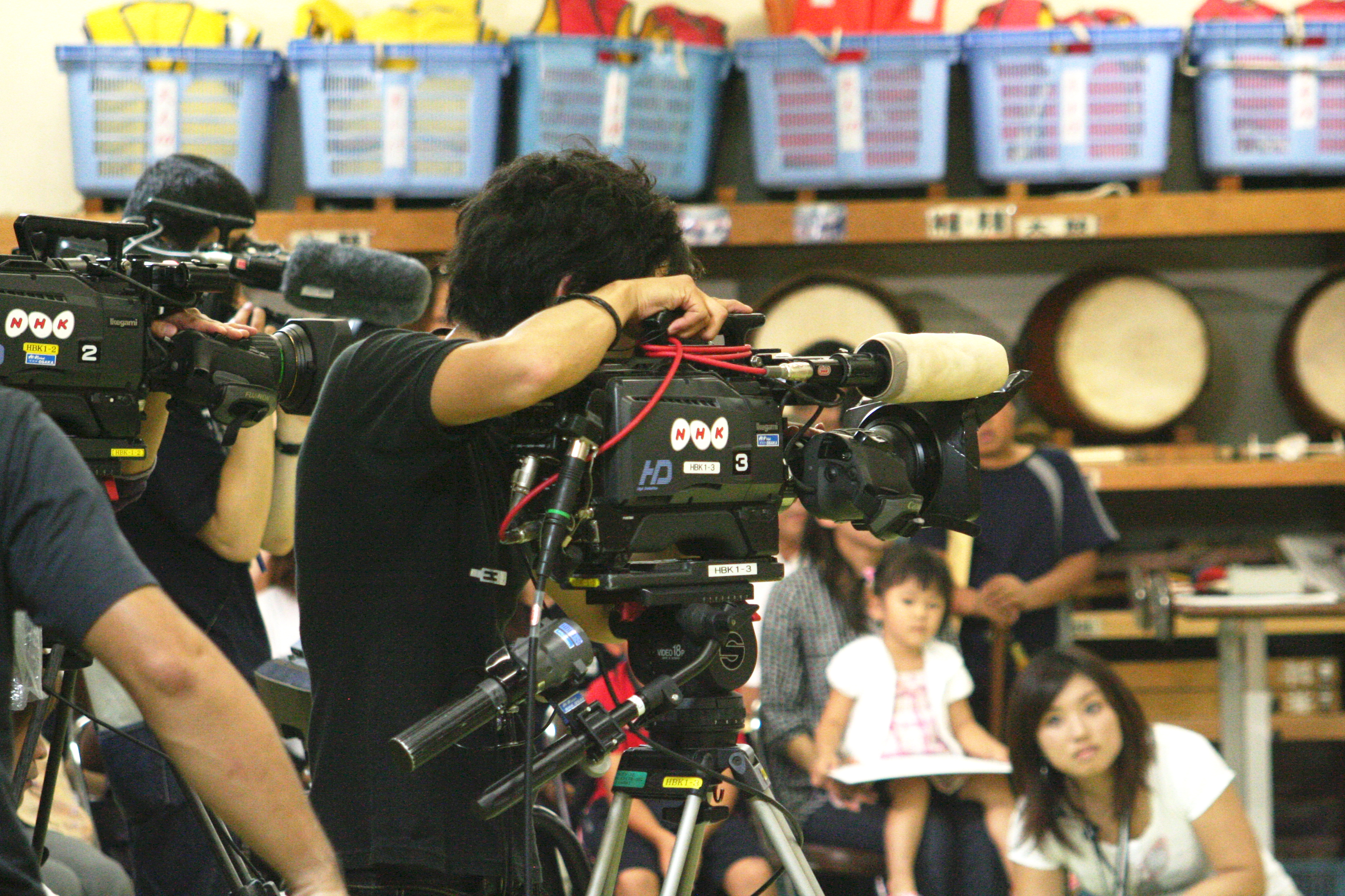 2009年9月29日から10月1日にかけて行なわれたNHK神戸のテレビ実況中継キャラバンによるテレビ収録の様子。キャラバンの司会者は今城和久と久保静。最終中継地である相生市内の相生ペーロン城にて撮影。